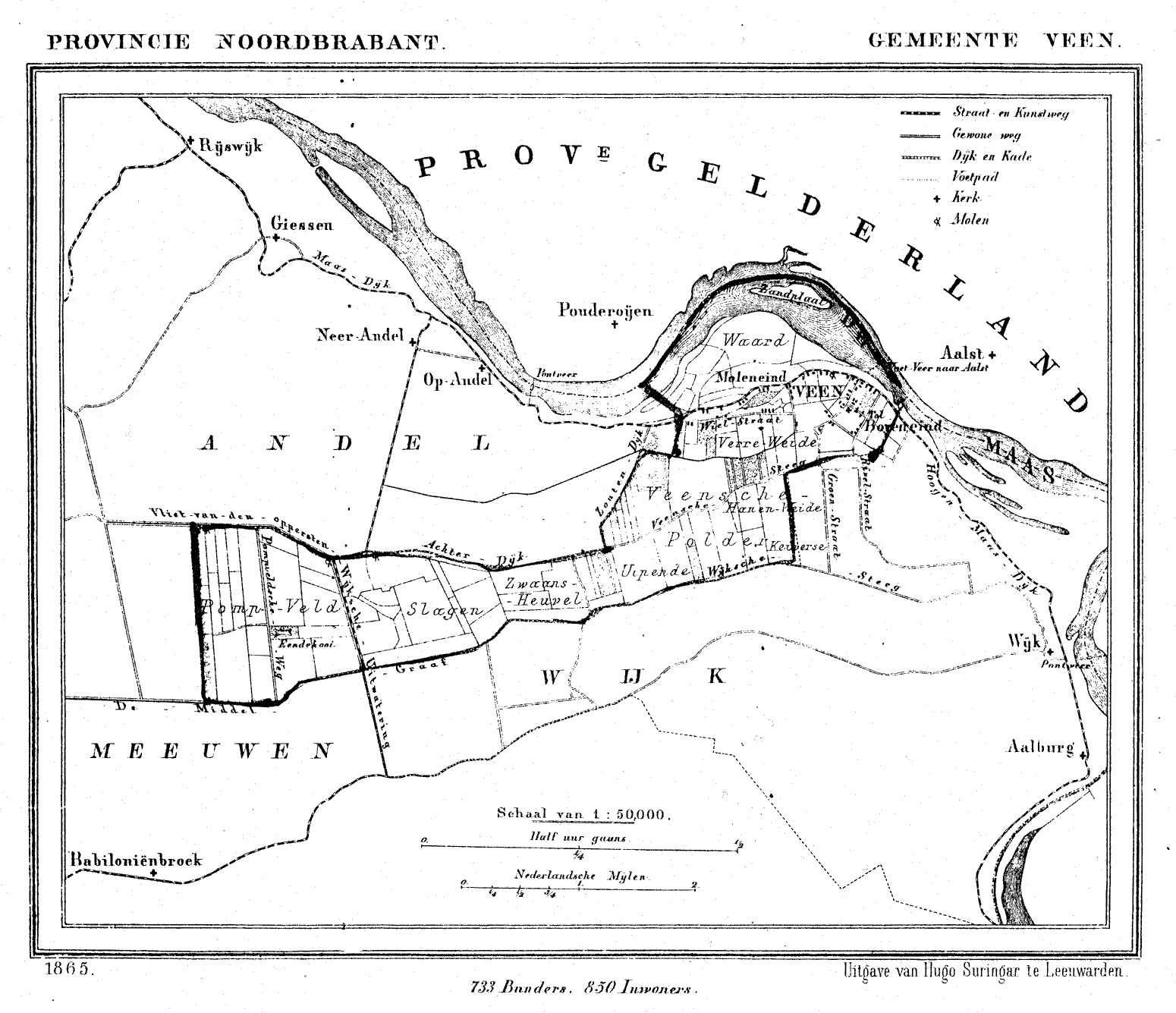 Nederland, Noord-Brabant, Gemeente Veen